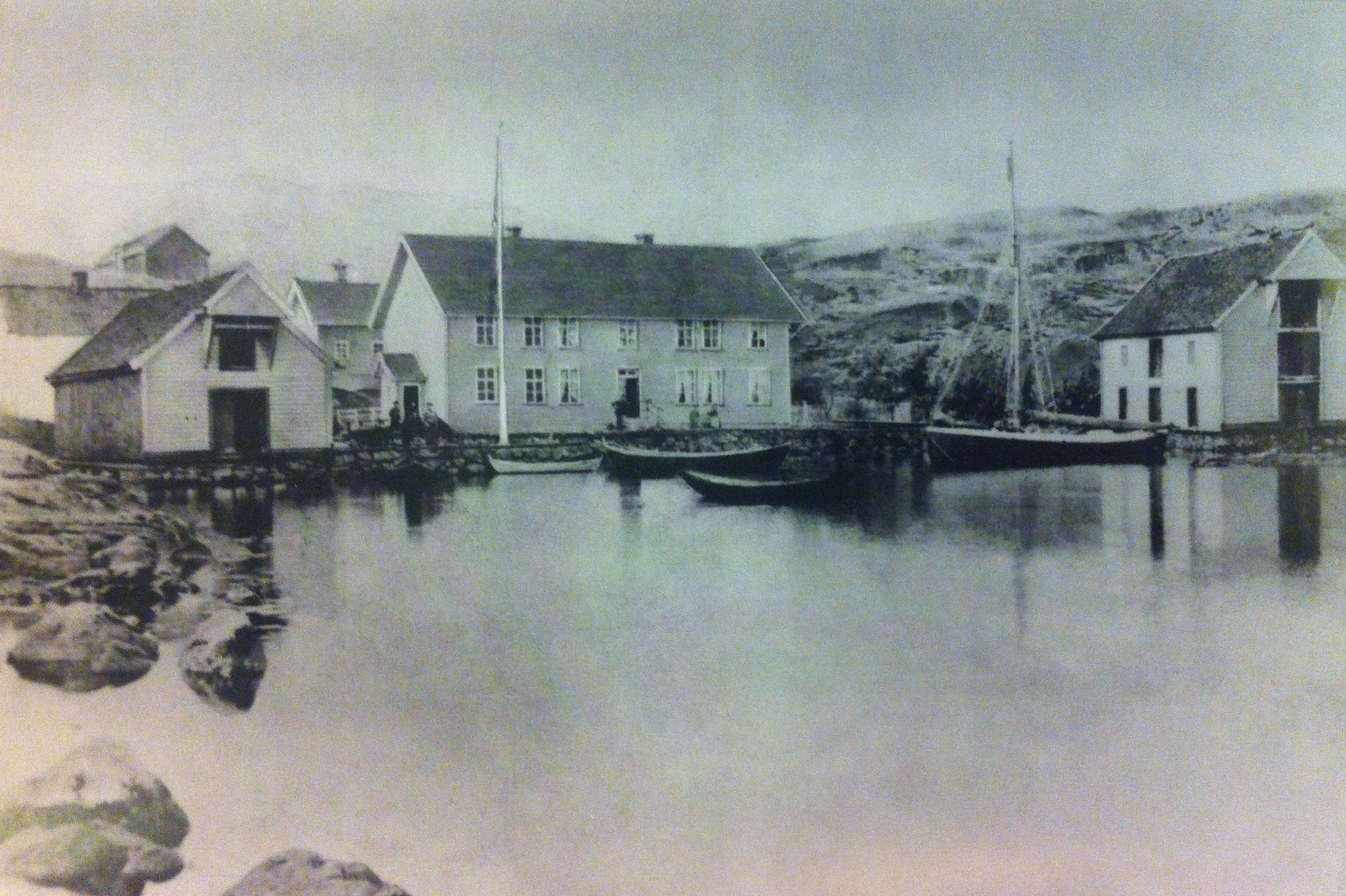 Bekkjarvik like etter år 1900